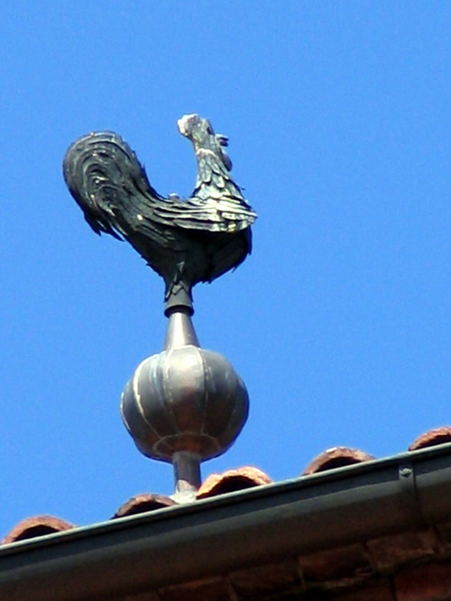 Asti ,Collegiata di S.Secondo, part. Foto fatta da me Faberh